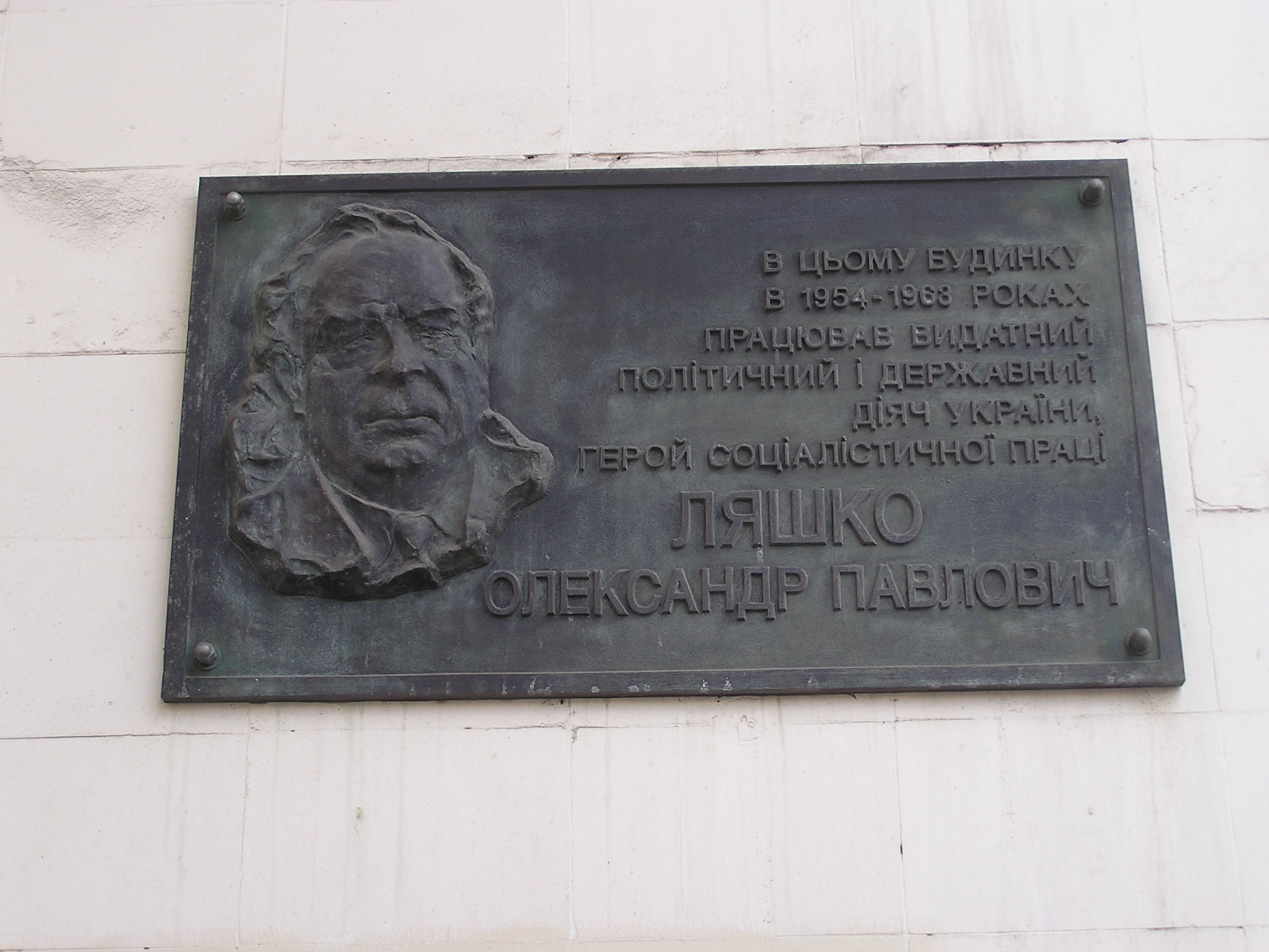 Мемориальная доска в Донецке